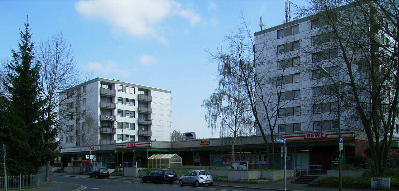 Bildbeschreibung: Kaiserau, Nebenzentrum. Am Ort der ehemaligen Zechensiedlung "Sektion 6" erbautes Wohn- und Einkaufszentrum im Stil der 1970er Jahre Quelle: Eigenes Foto Fotograf/Zeichner: Smial Datum: 22.04.2006 Andere Ansicht: Image:Kaiserau Nebenzentrum 1.jpg